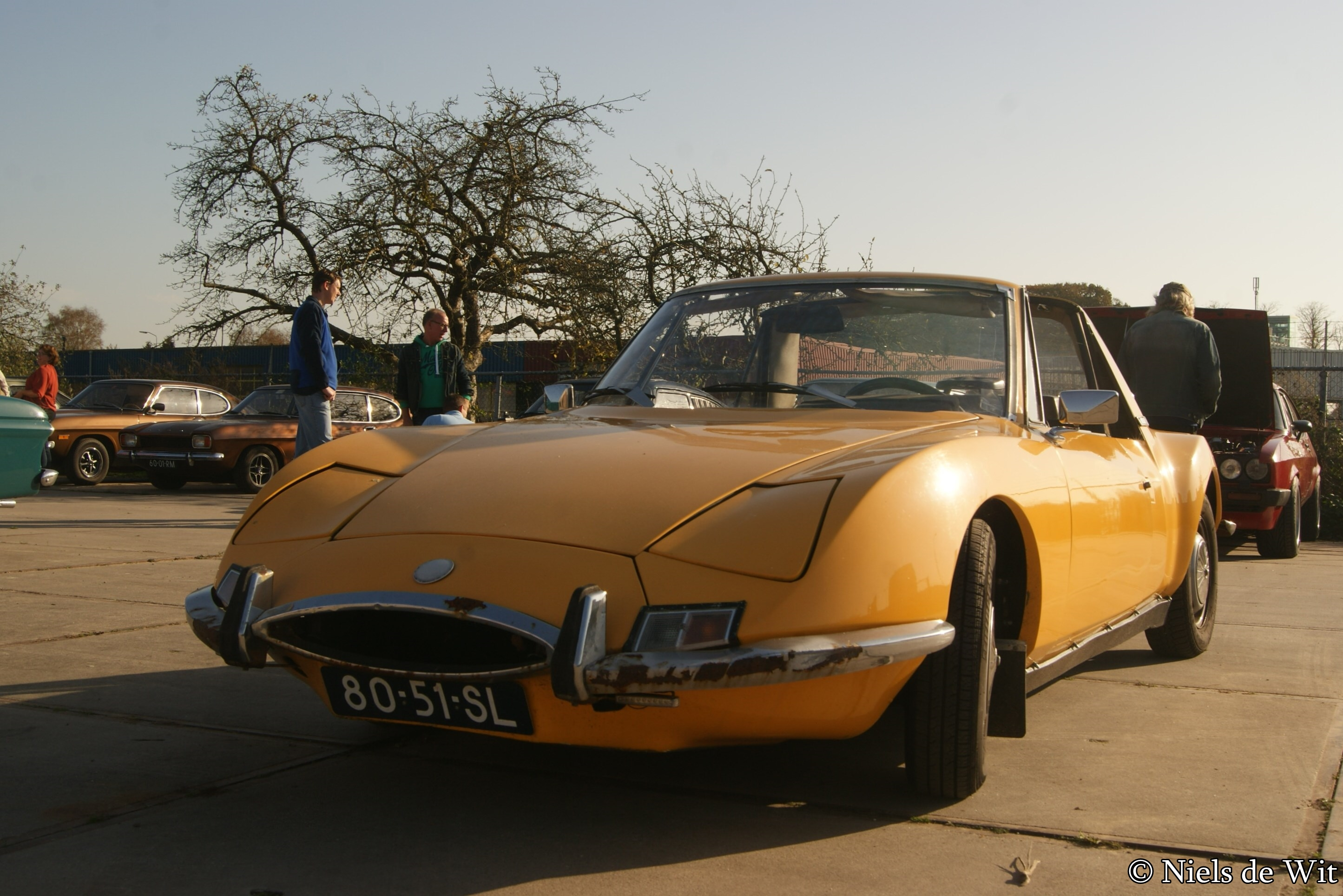 80-51-SL Ford Onderdelendag, Barneveld